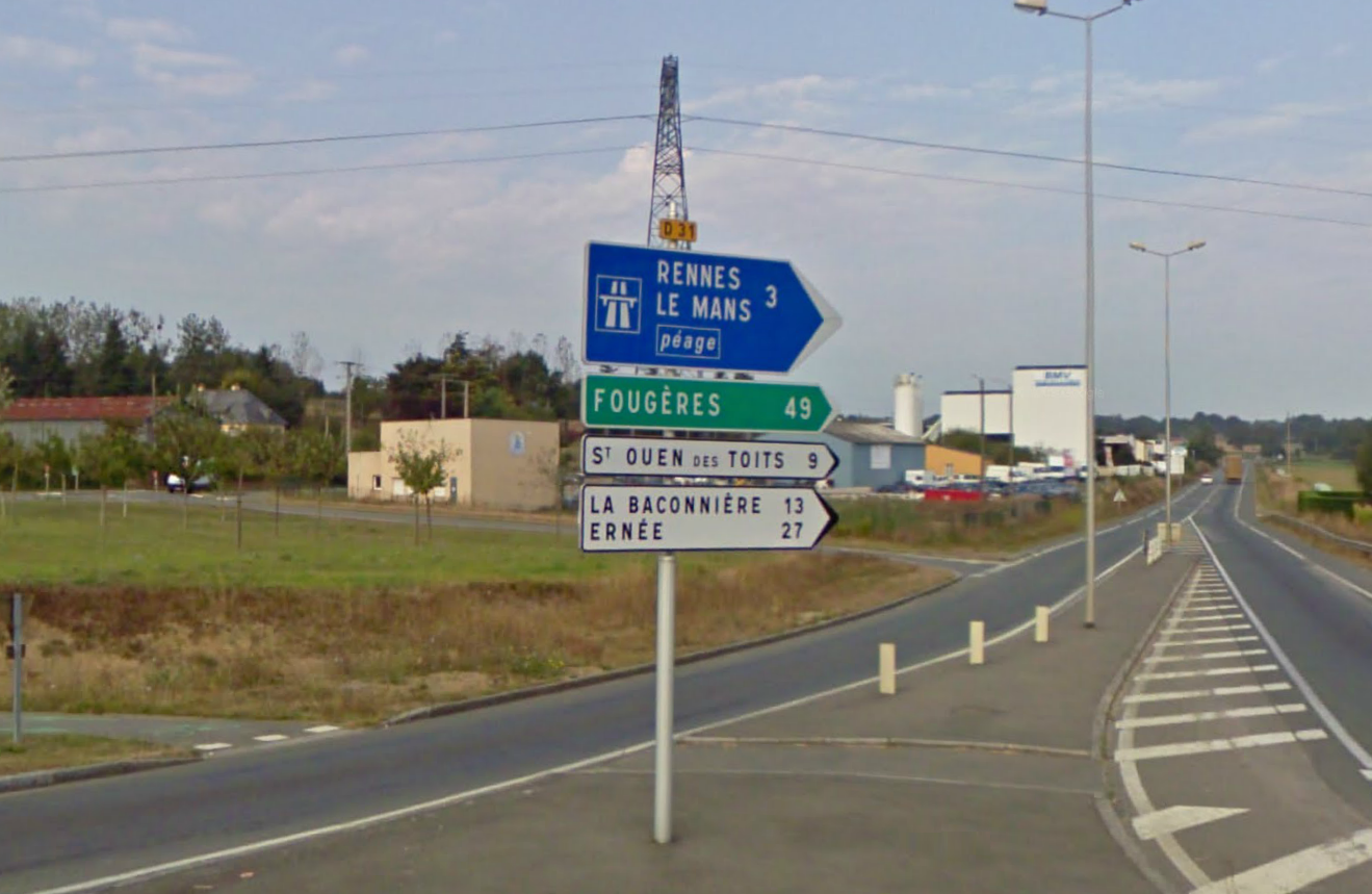 Extrémité sud de la route départementale 31 prêt de Laval en Mayenne.